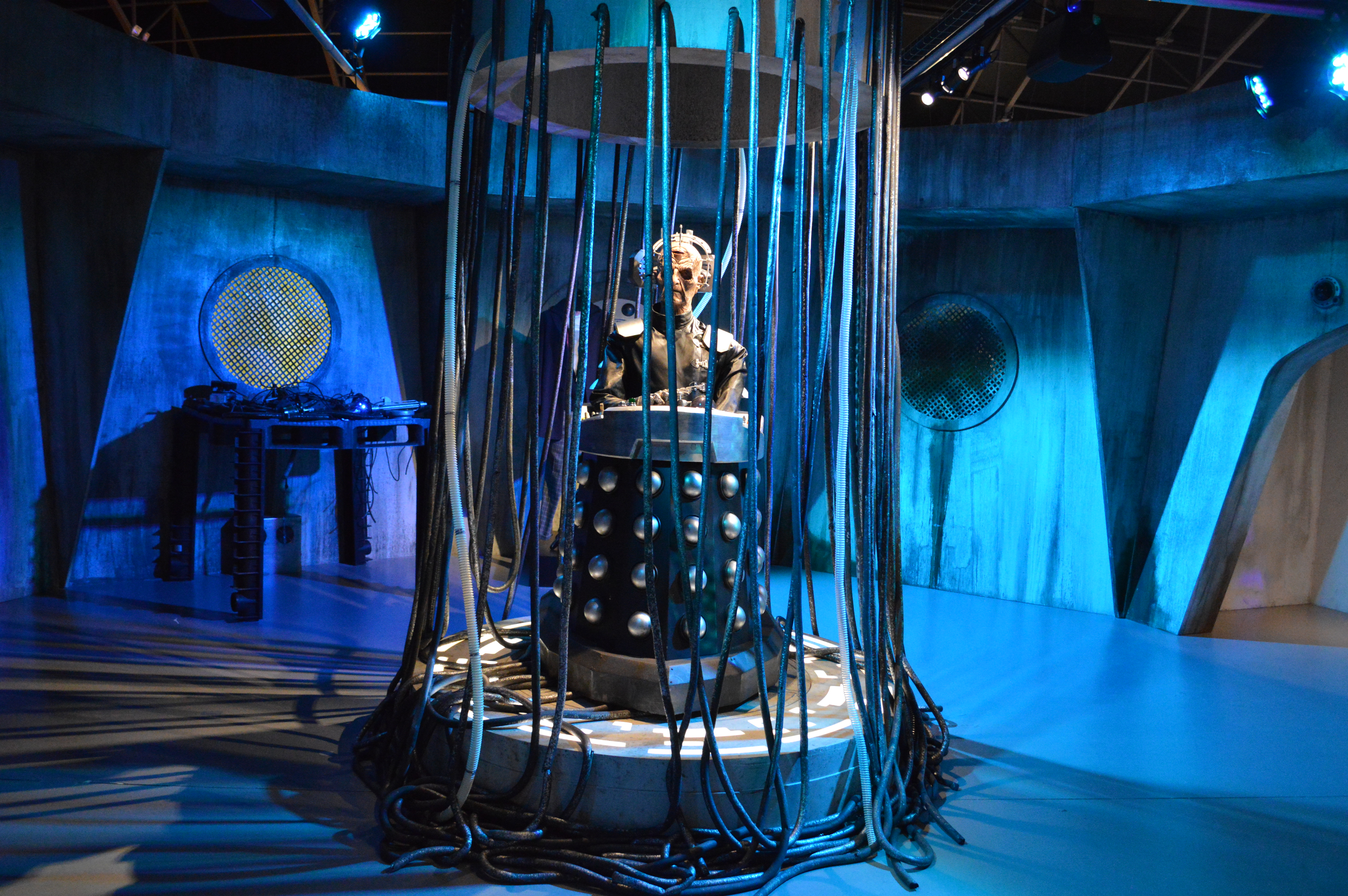 Davros Doctor Who Experience